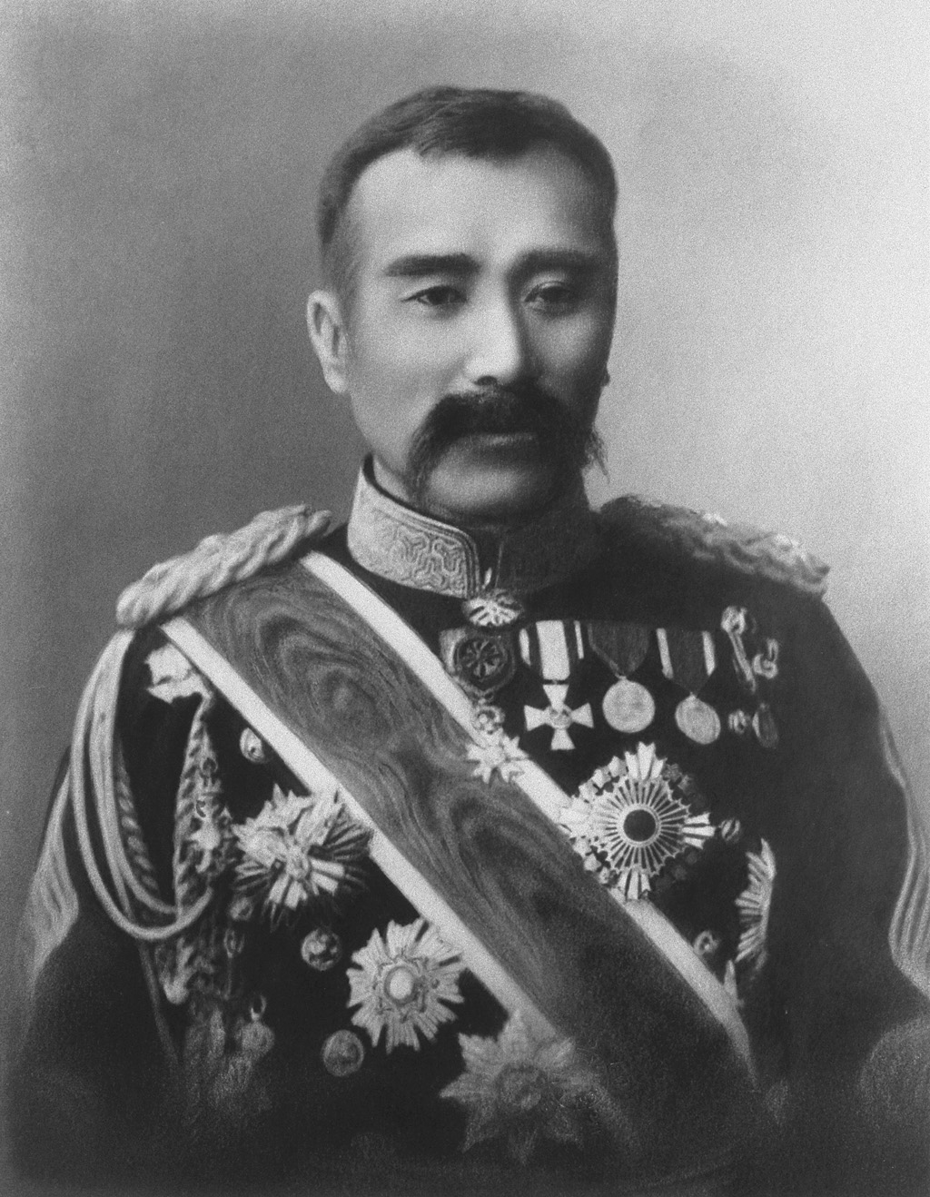 Portrait of Kawakami Soroku (川上操六, 1848 – 1899)